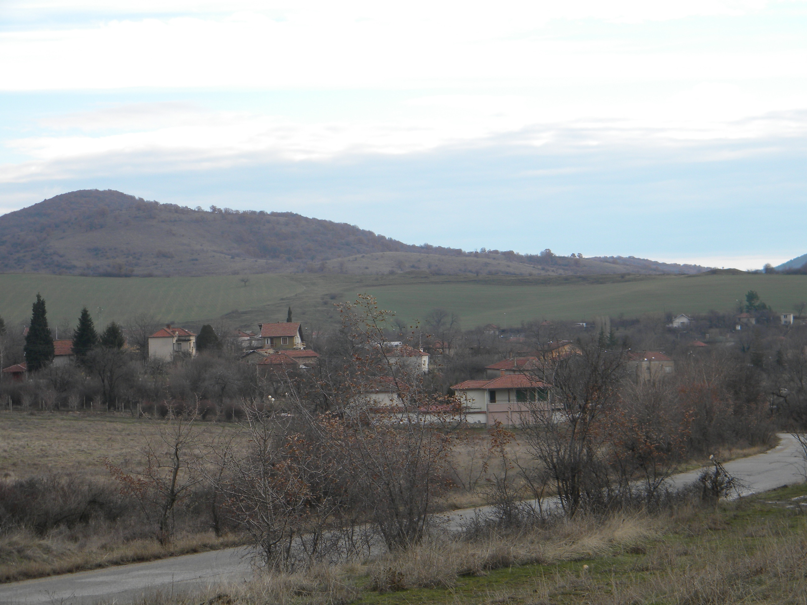 Село Сладък кладенец